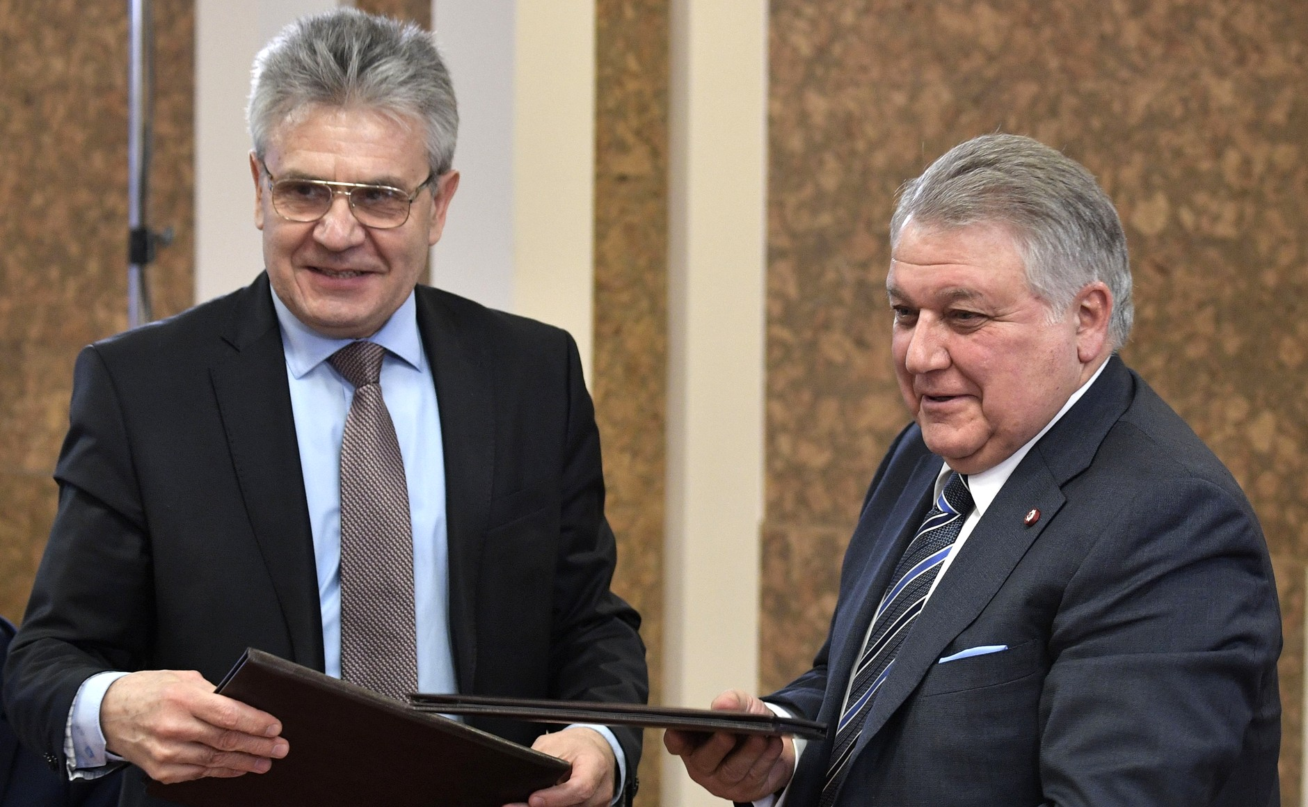 Президент Российской академии наук Александр Сергеев (слева) и президент Национального исследовательского центра «Курчатовский институт» подписали соглашение о сотрудничестве между РАН и НИЦ «Курчатовский институт»